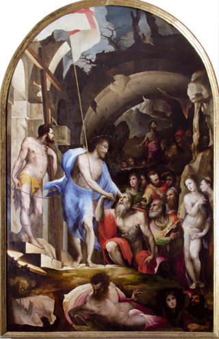 Beccafumi, cristo al limbo